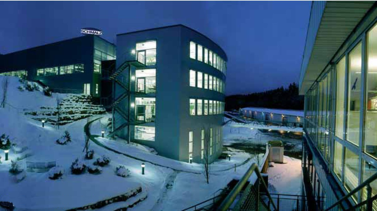 zeigt das Firmengelände der J. Schmalz GmbH im Winter und stammt aus unserem Prduktkatalog.